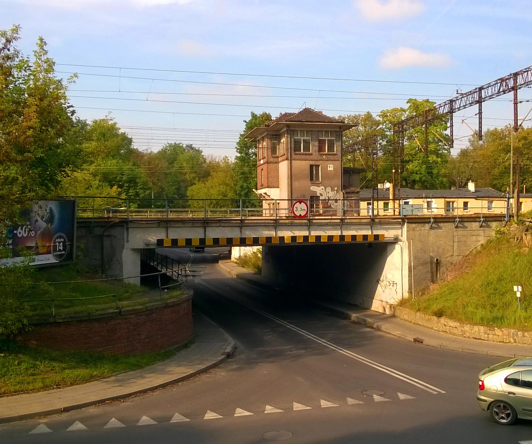 Wiadukty kolejowe z 1861 roku w Toruniu